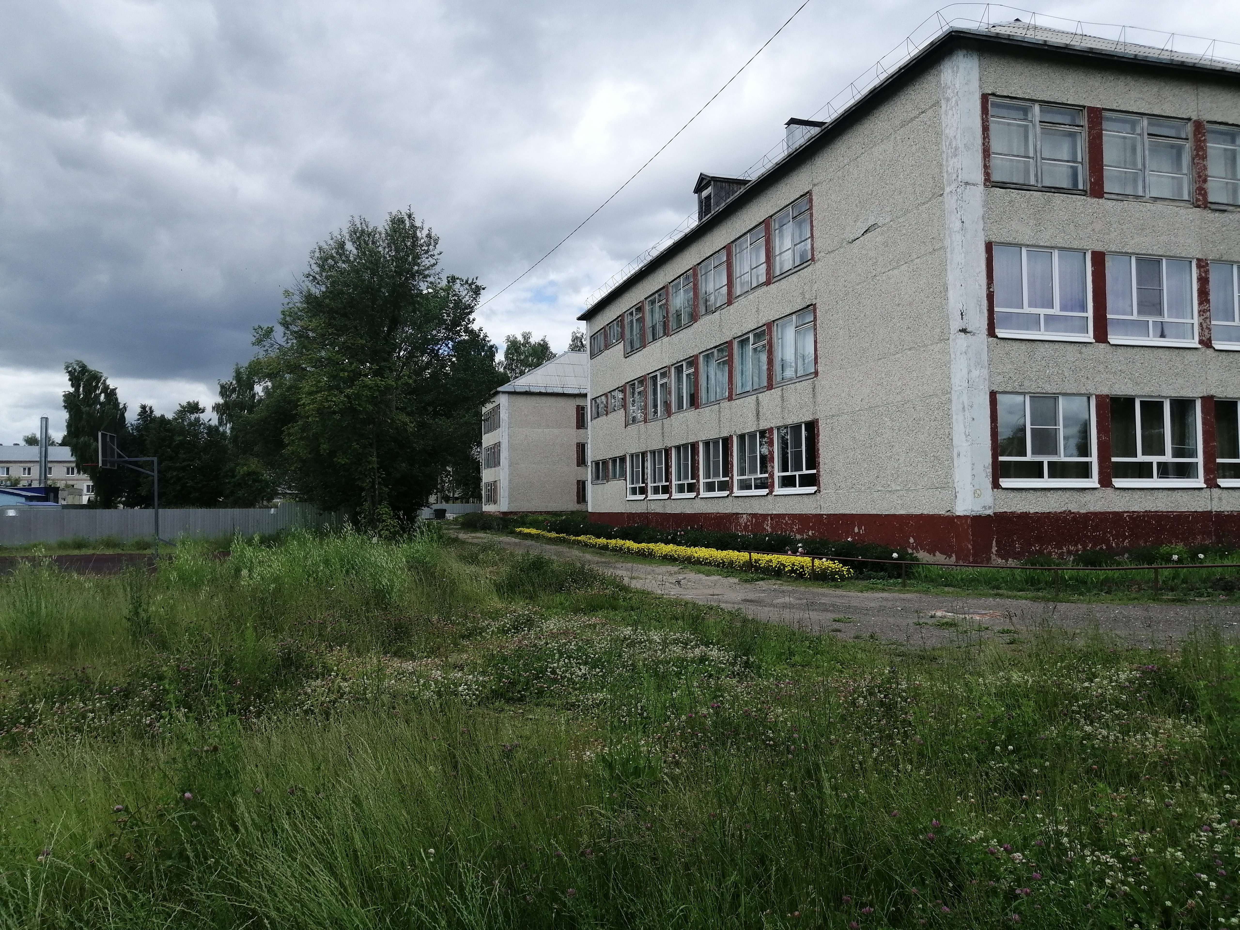 Красногорская СОШ №2